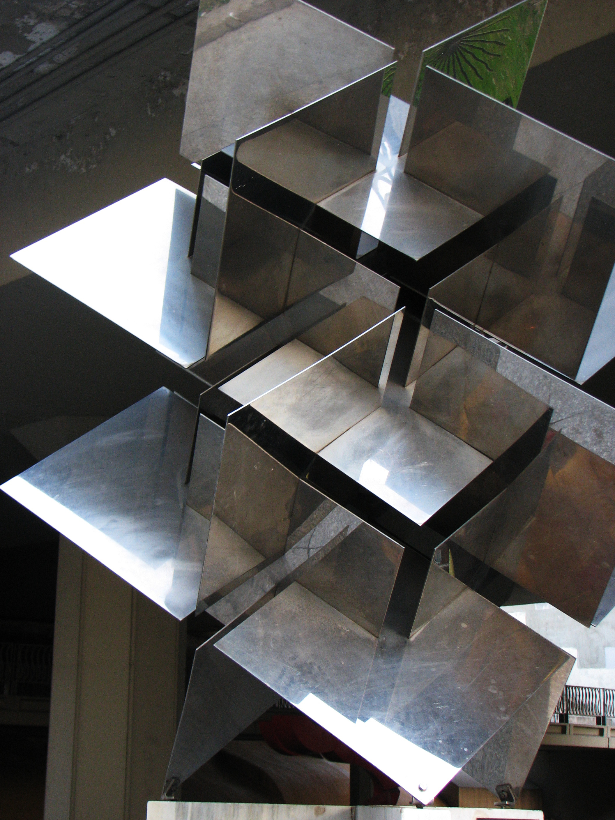 Sculpture by Francisco Sobrino in the open-air museum Museo de Escultura al Aire Libre de la Castellana, Madrid/Spain